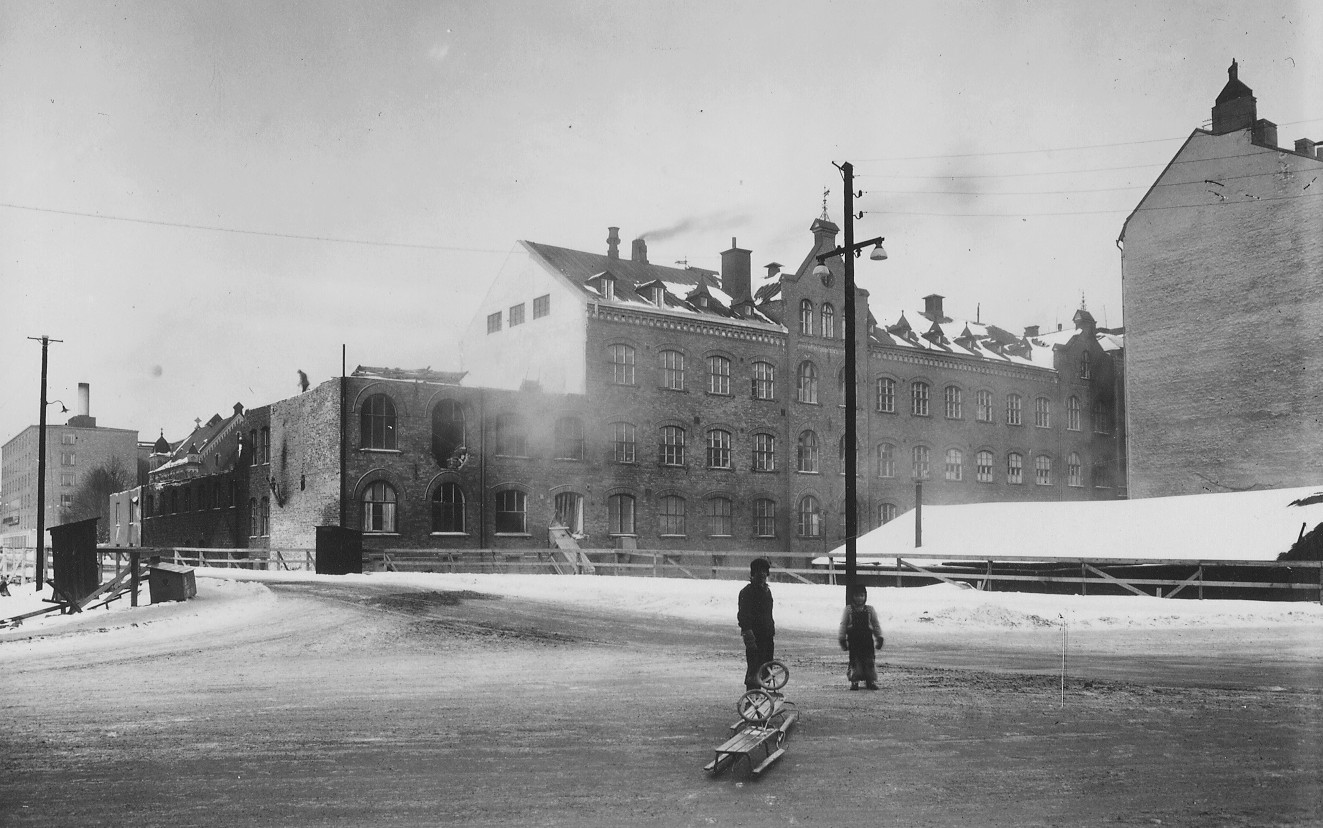 F.d. Hellgrens tobaksfabrik under rivning, i förgrunden den nya Södergatan och Katarina bangata